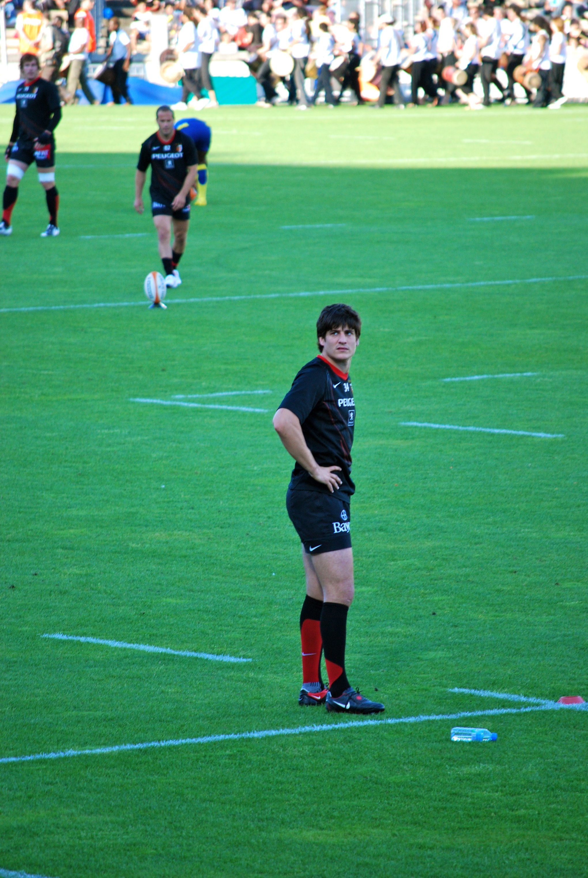 David Skrela avant la demi-finale Toulouse/Clermont du top 14 2008-2009. A l'arrière plan, Frédéric Michalak.